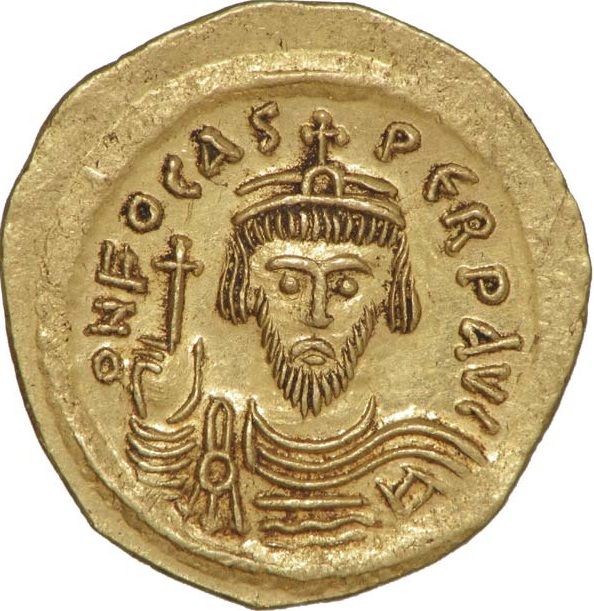 Solidus des Kaisers Phokas 602-610, Konstantinopel